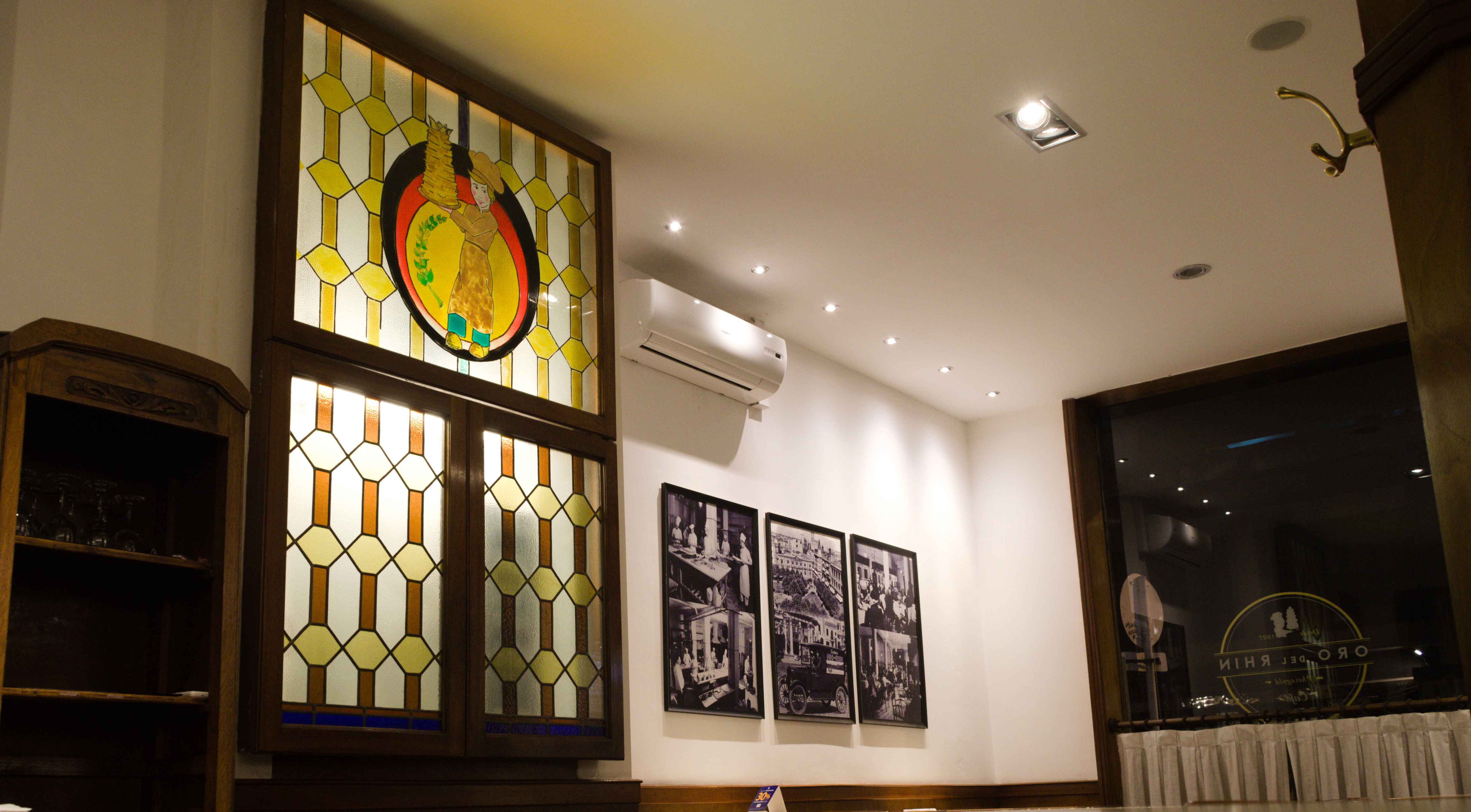 Interior Oro del Rhin Café, Montevideo, Uruguay